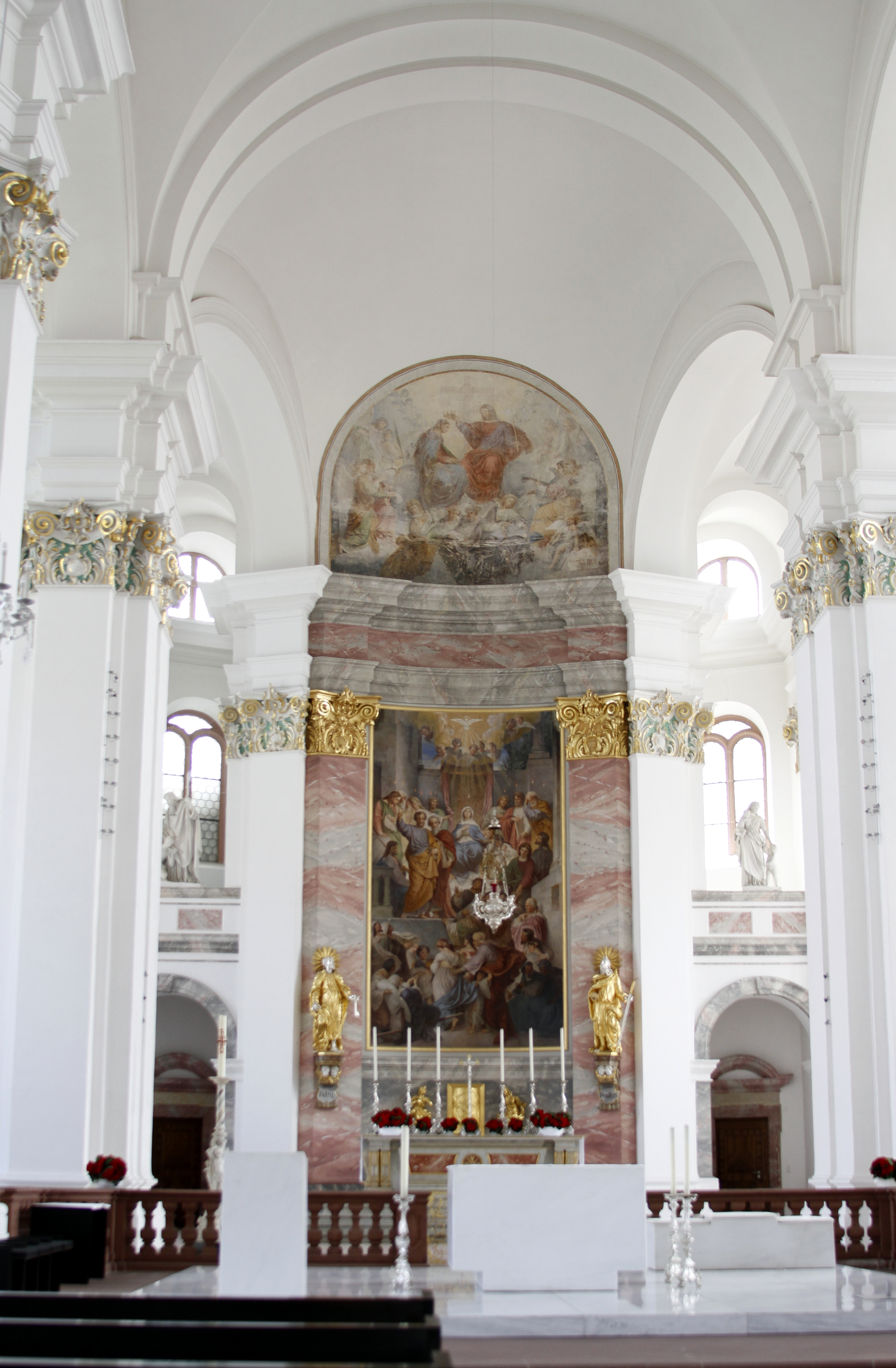 Jesuitenkirche - Heidelberg - Germany